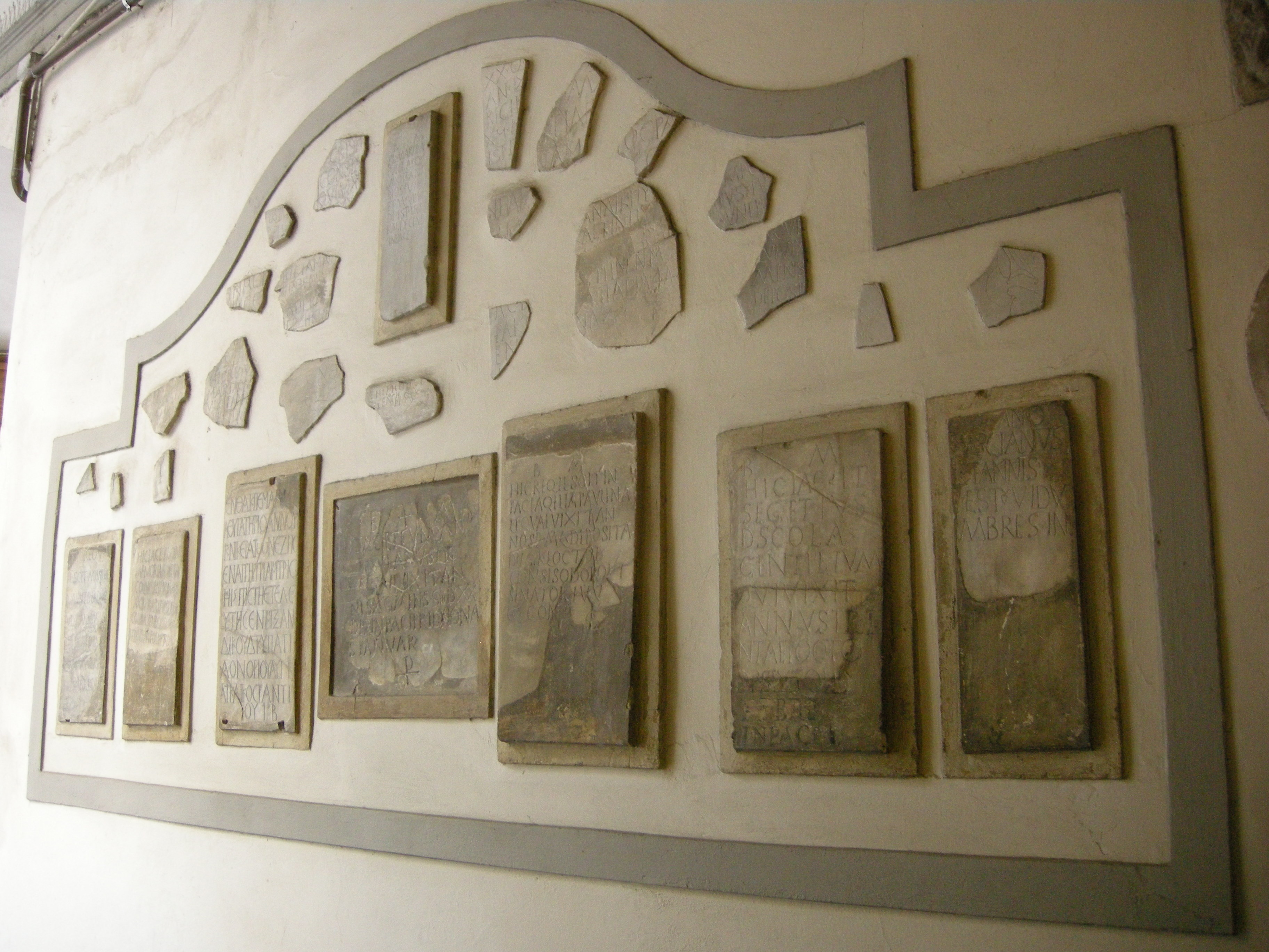 Santa Felicita, iscrizoni romane e paleocristiane